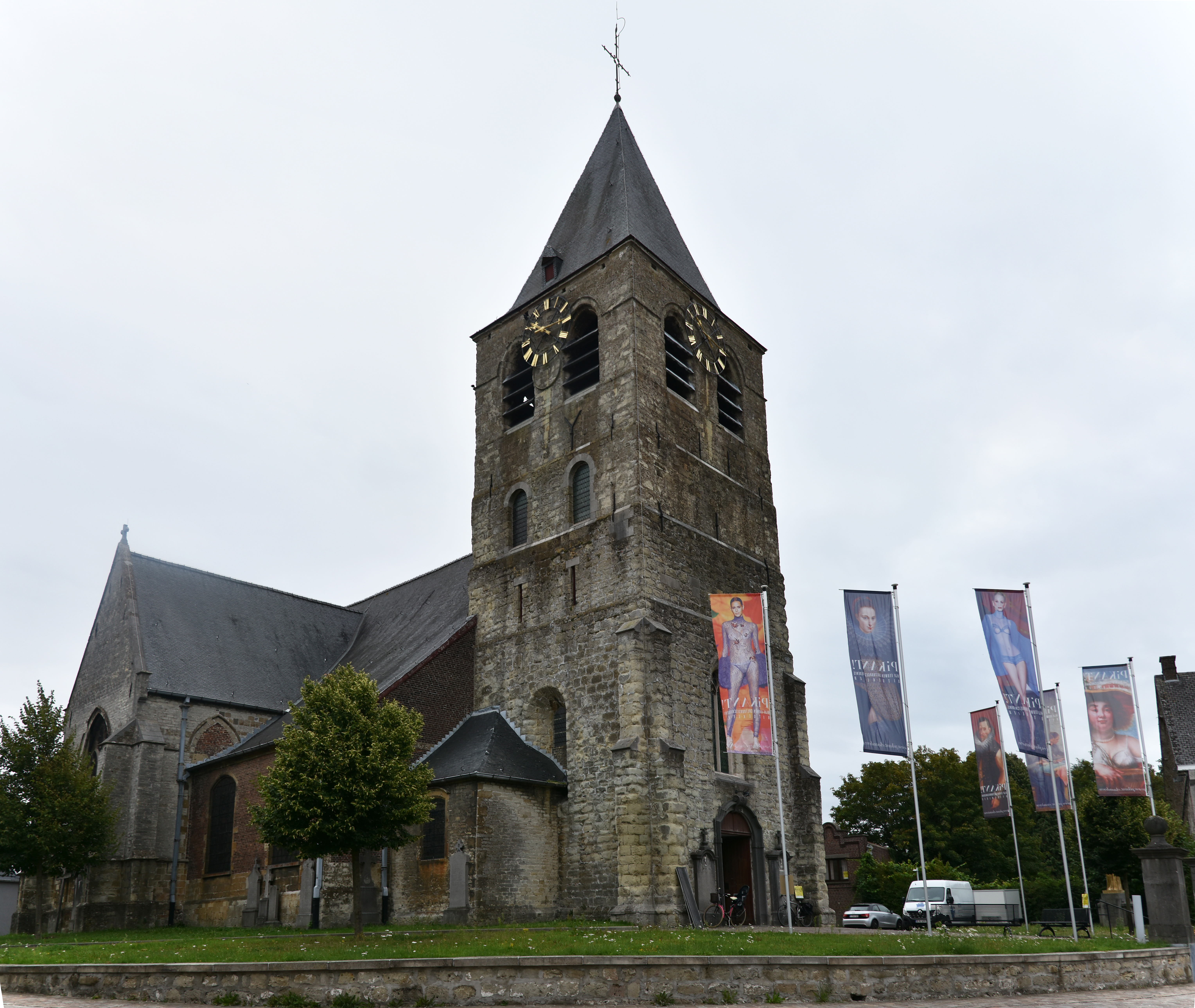 Sint-Martinuskerk (Moorsel) 3-09-2019 10-15-07 This photo of immovable heritage has been taken in the Flemish Region